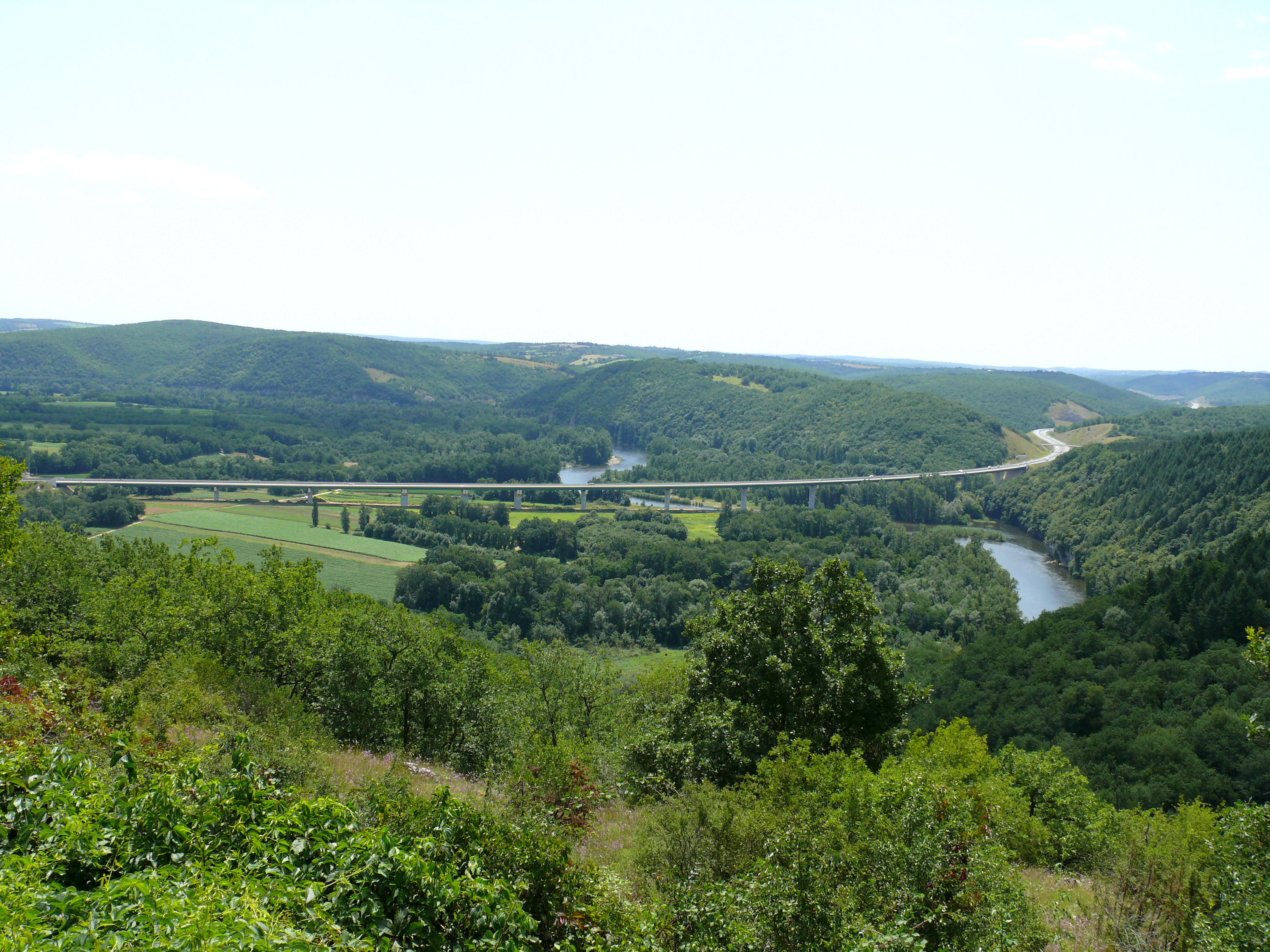 Autouroute A20 - Viaduc de la Dordogne